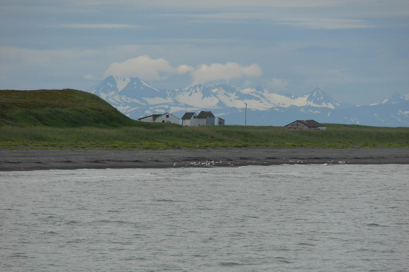 Bristol Bay (near Ugashik Bay), Alaska